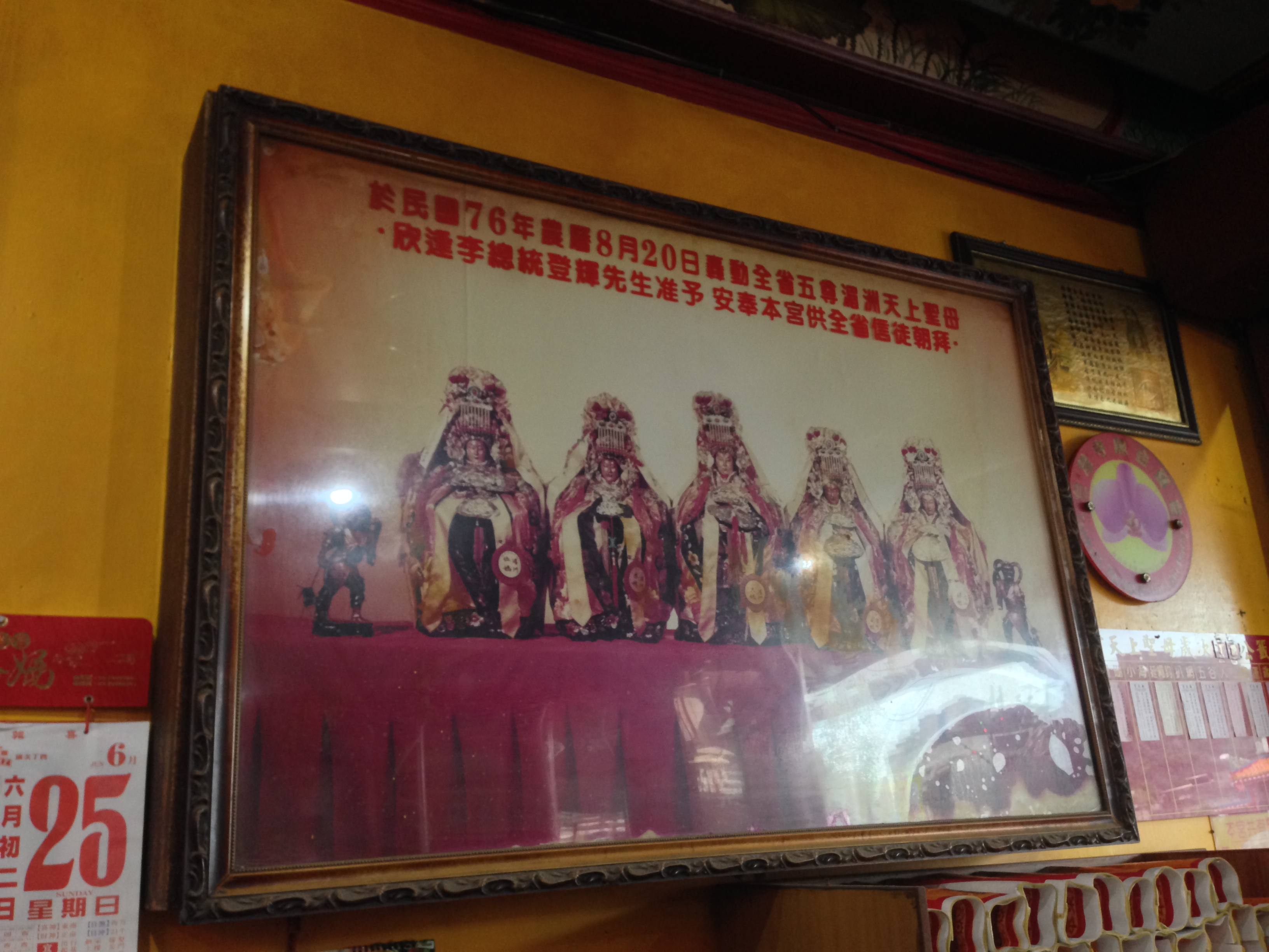 中文（台灣）: 南方澳南天宮五尊湄洲媽祖照